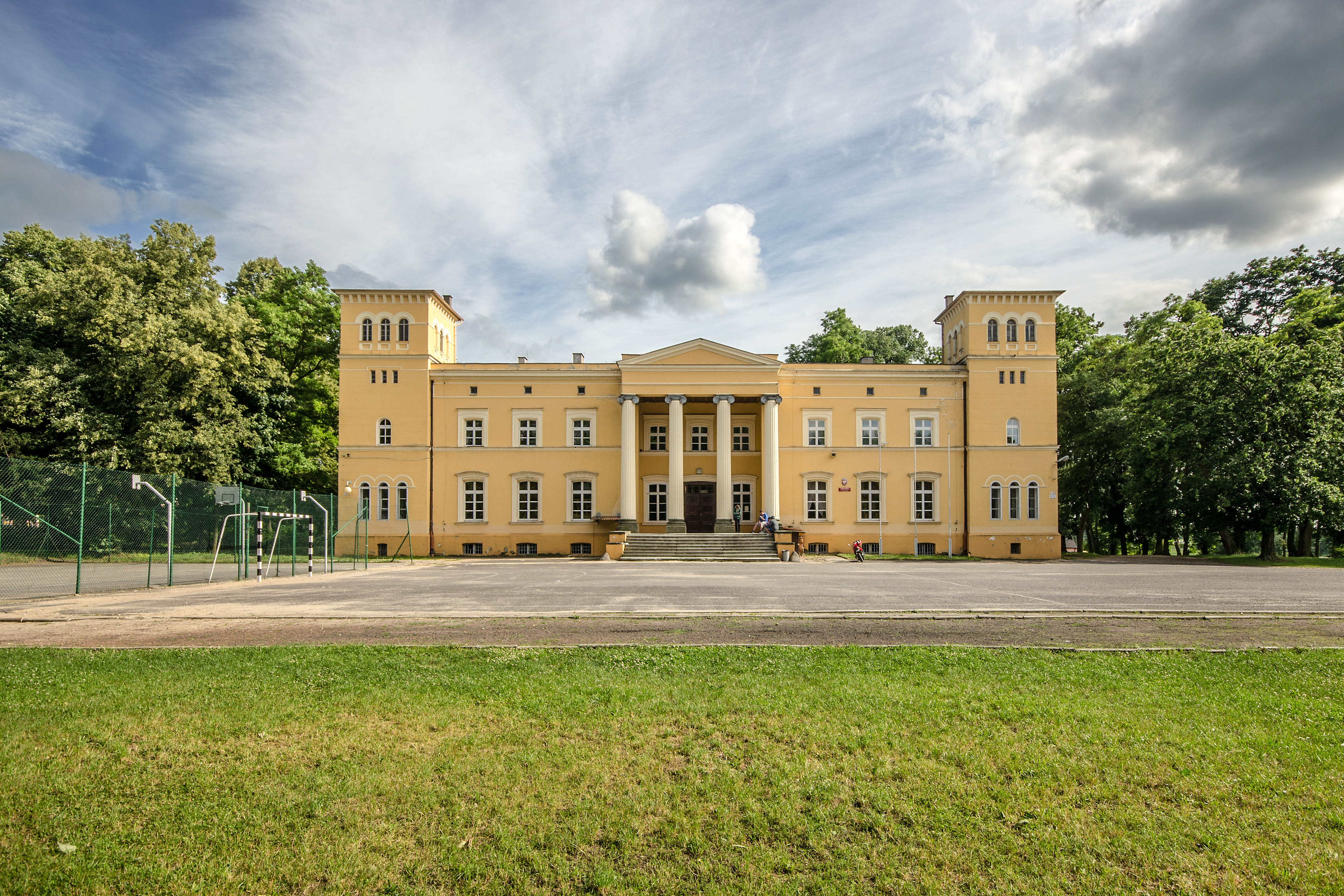 Mroczeń, pałac, 1840-50